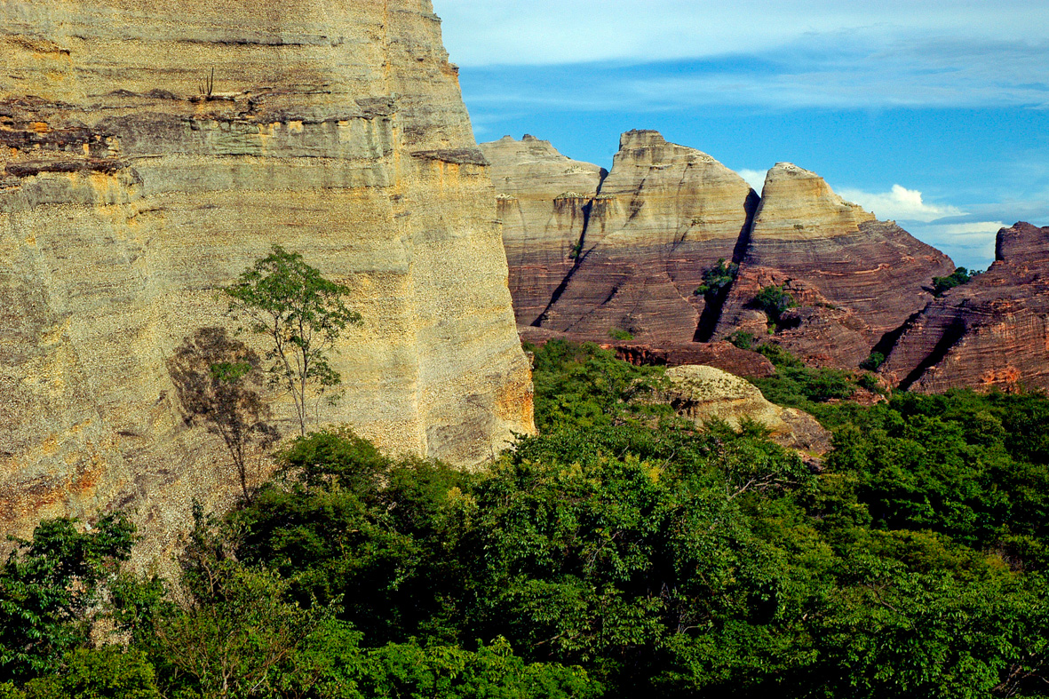 BOQUEIRAO DA PEDRA FURADA